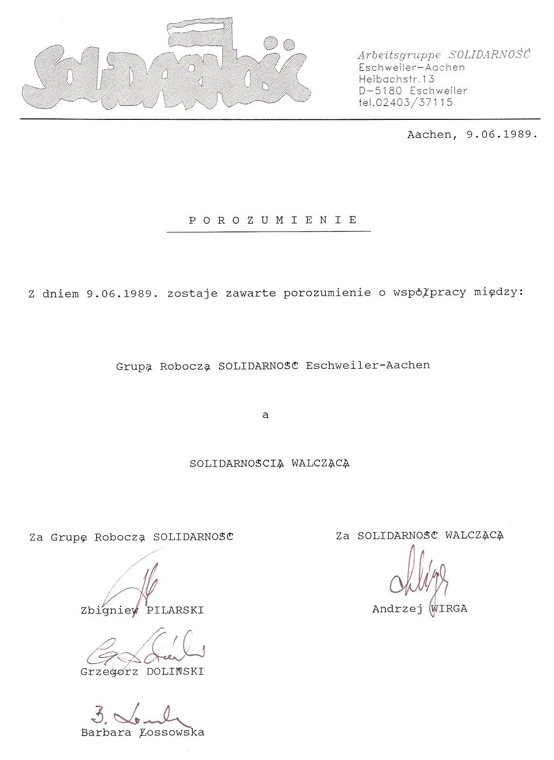 Umowa współpracy z Solidarnością Walczącą